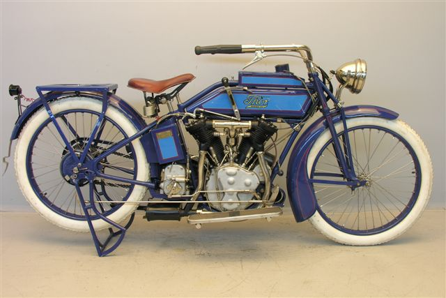 Thor 1000 cc motorcycle from 1916.